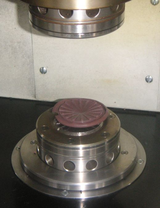 Vulkameter (selbst fotografiert, gemeinfrei) im Einsatz: Die Kammer ist geöffnet, auf der unteren Kammerhälfte liegt der Prüfkörper, die Messung ist abgeschlossen.